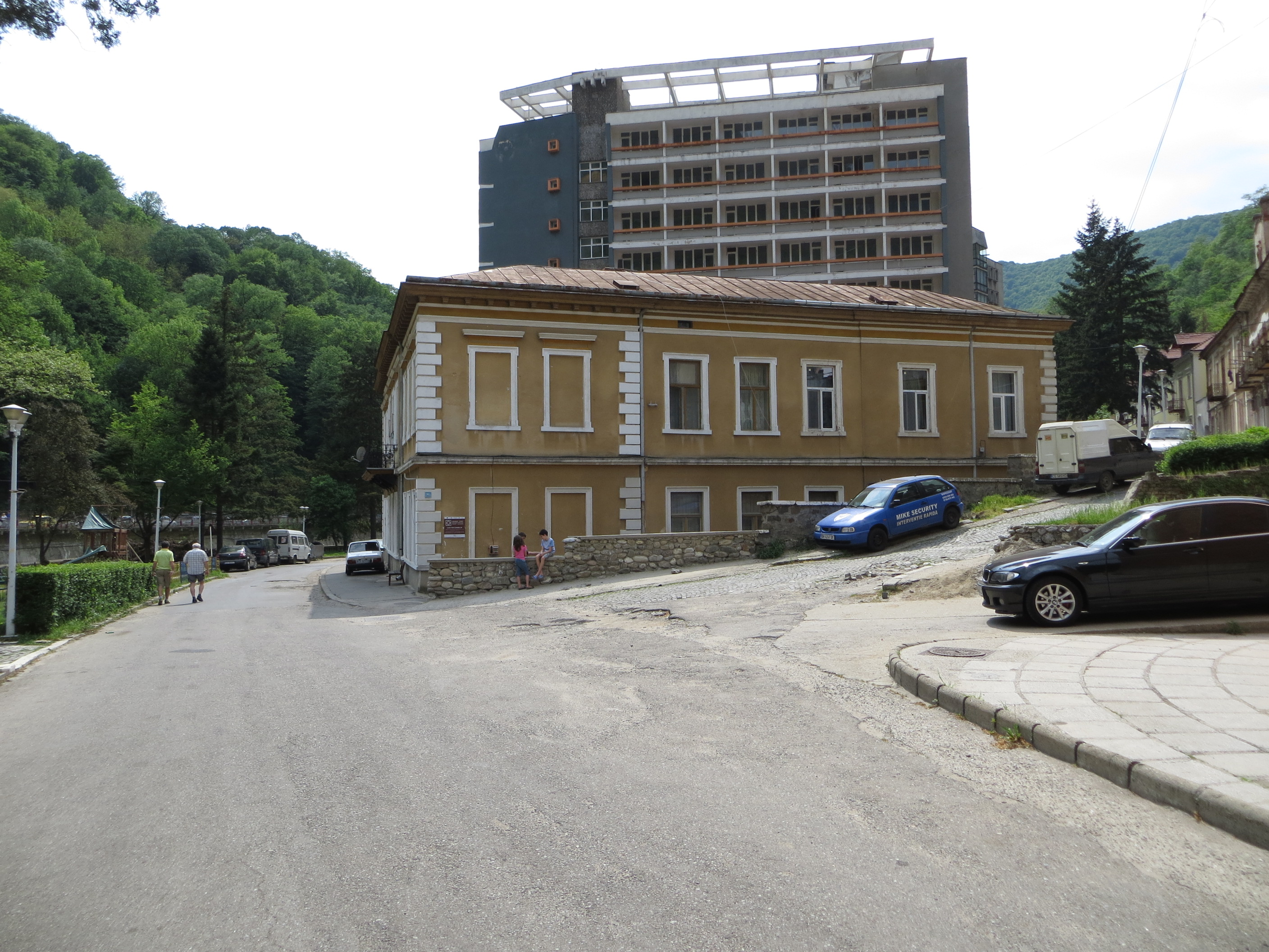 Vila funcționarilor, azi Pavilion 11